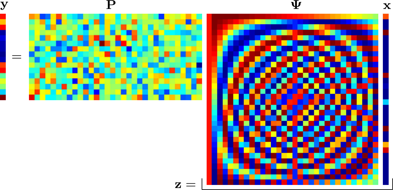 Schéma úlohy komprimovaného snímání